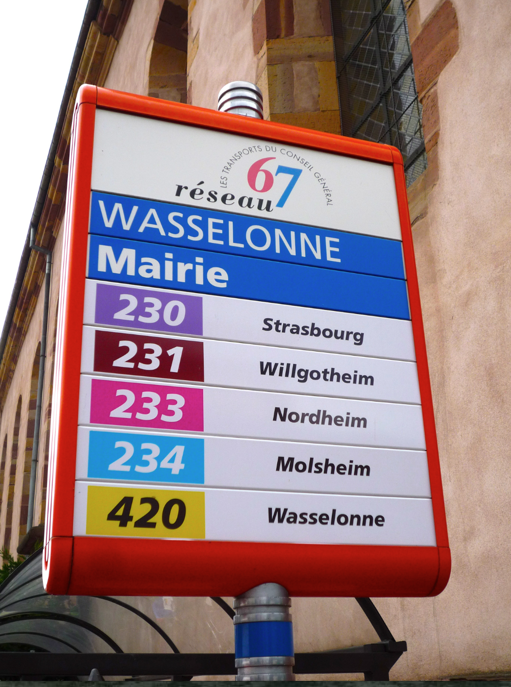 Wasselonne, panneau CTBR mairie